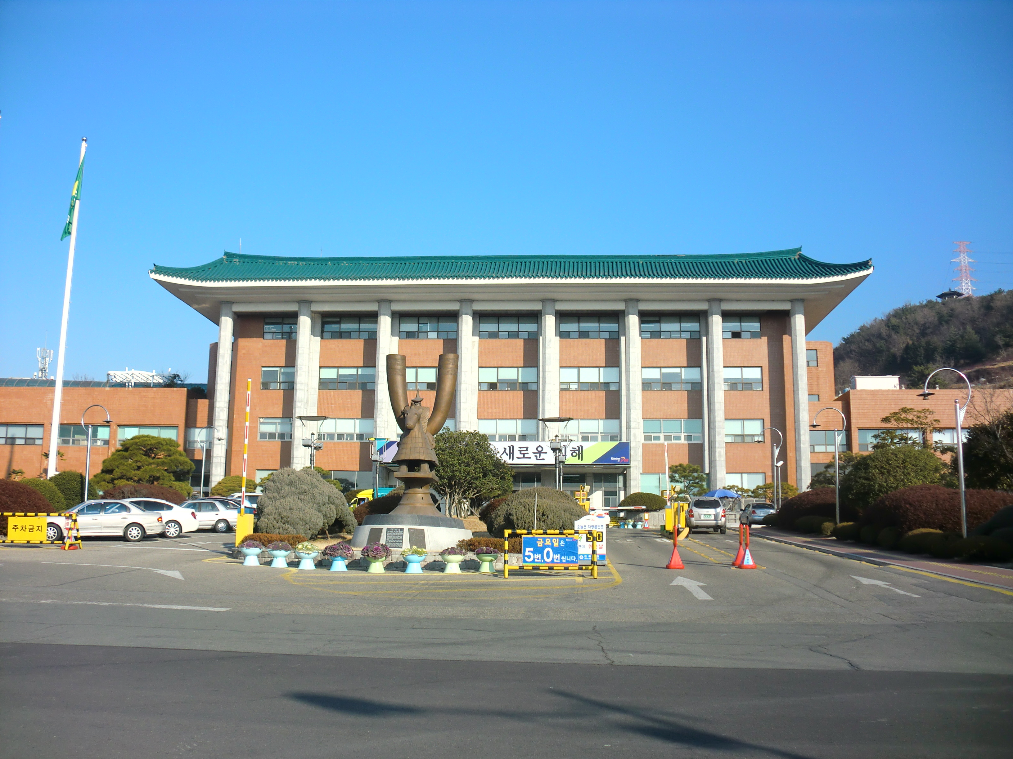 경상남도 김해시에 있는 김해시청